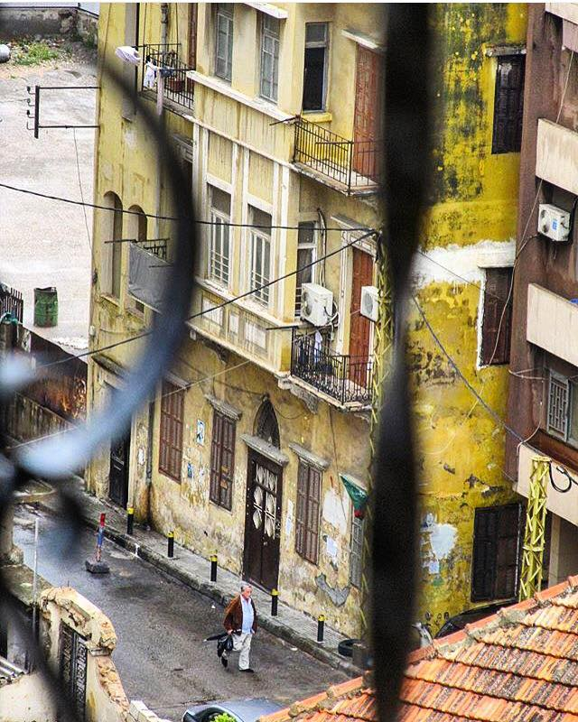 تبين الصورة بيروت زقاق البلاط عام 1960